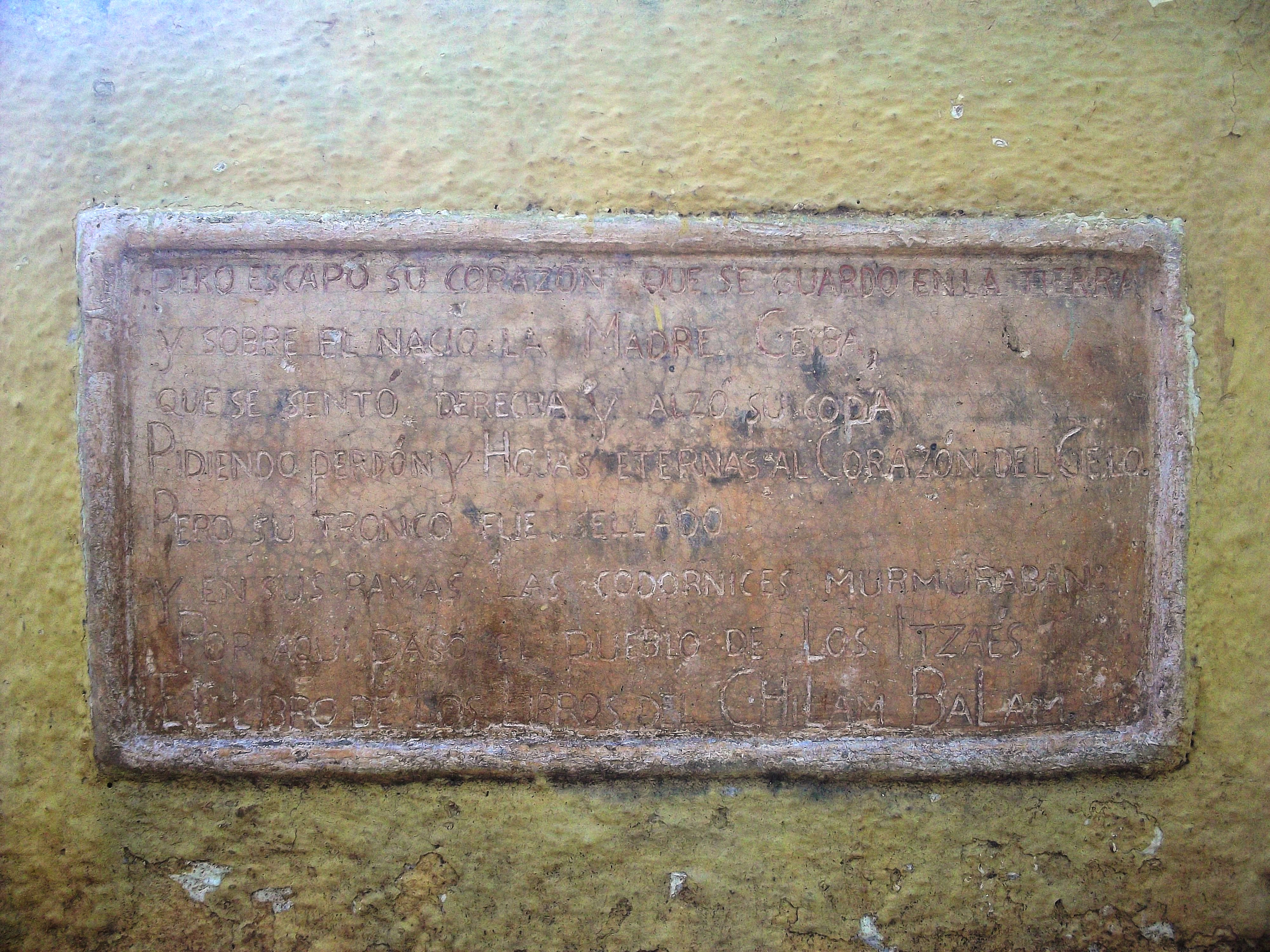 Piedra grabada con frases del Chilam Balam, Cholul, Yucatán.